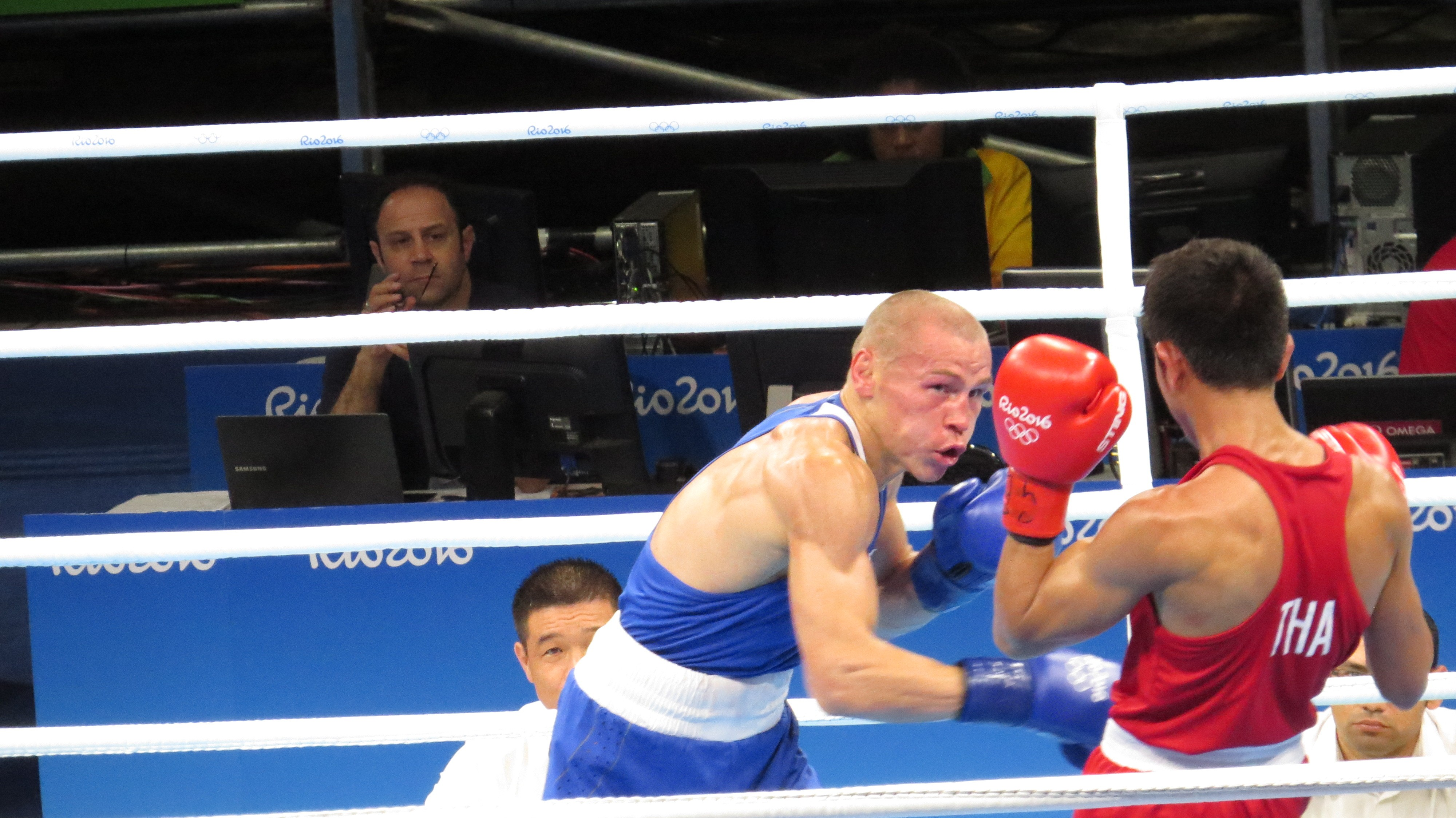 Sx50